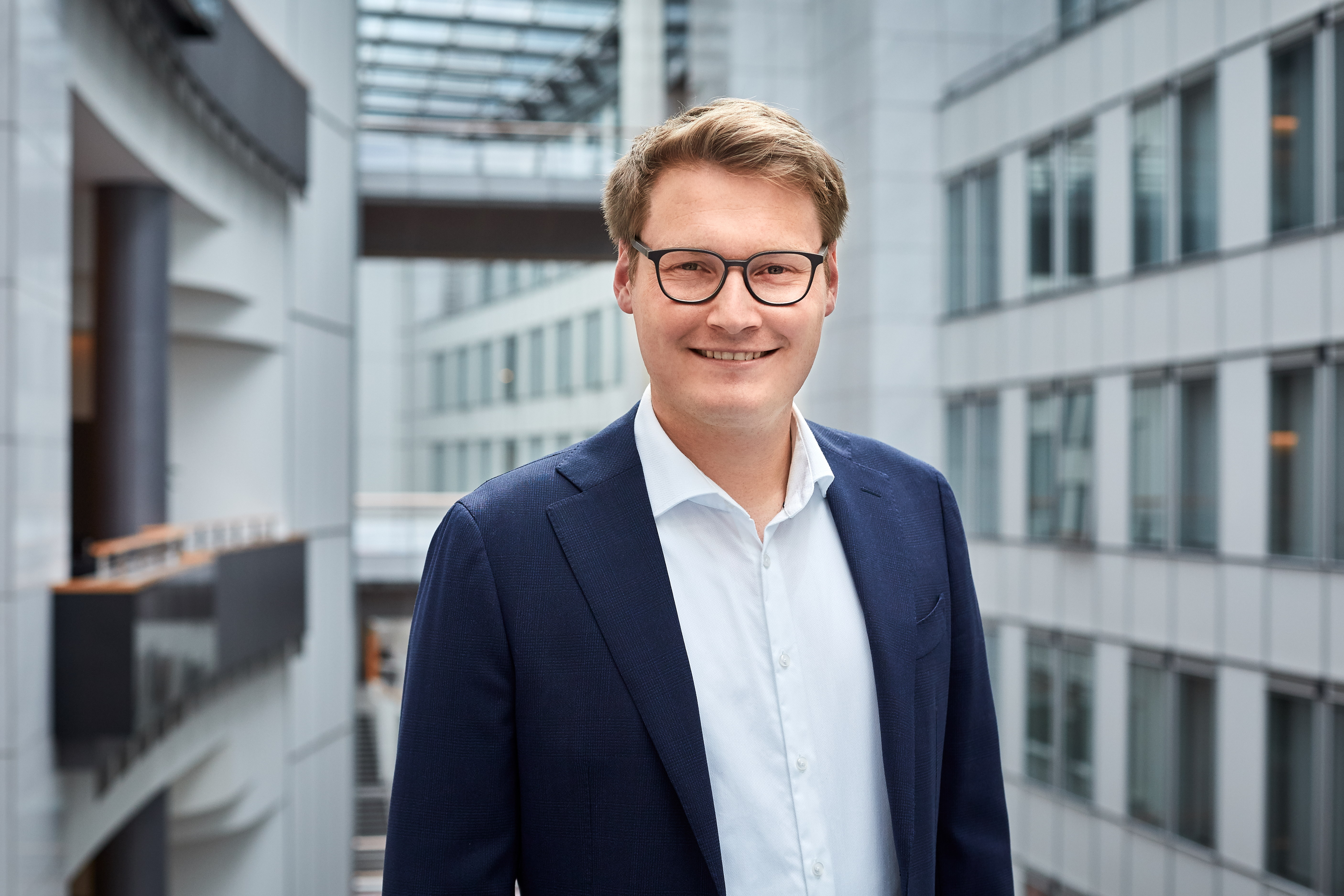 Moritz Körner MdEP im Europäischen Parlament in Brüssel.